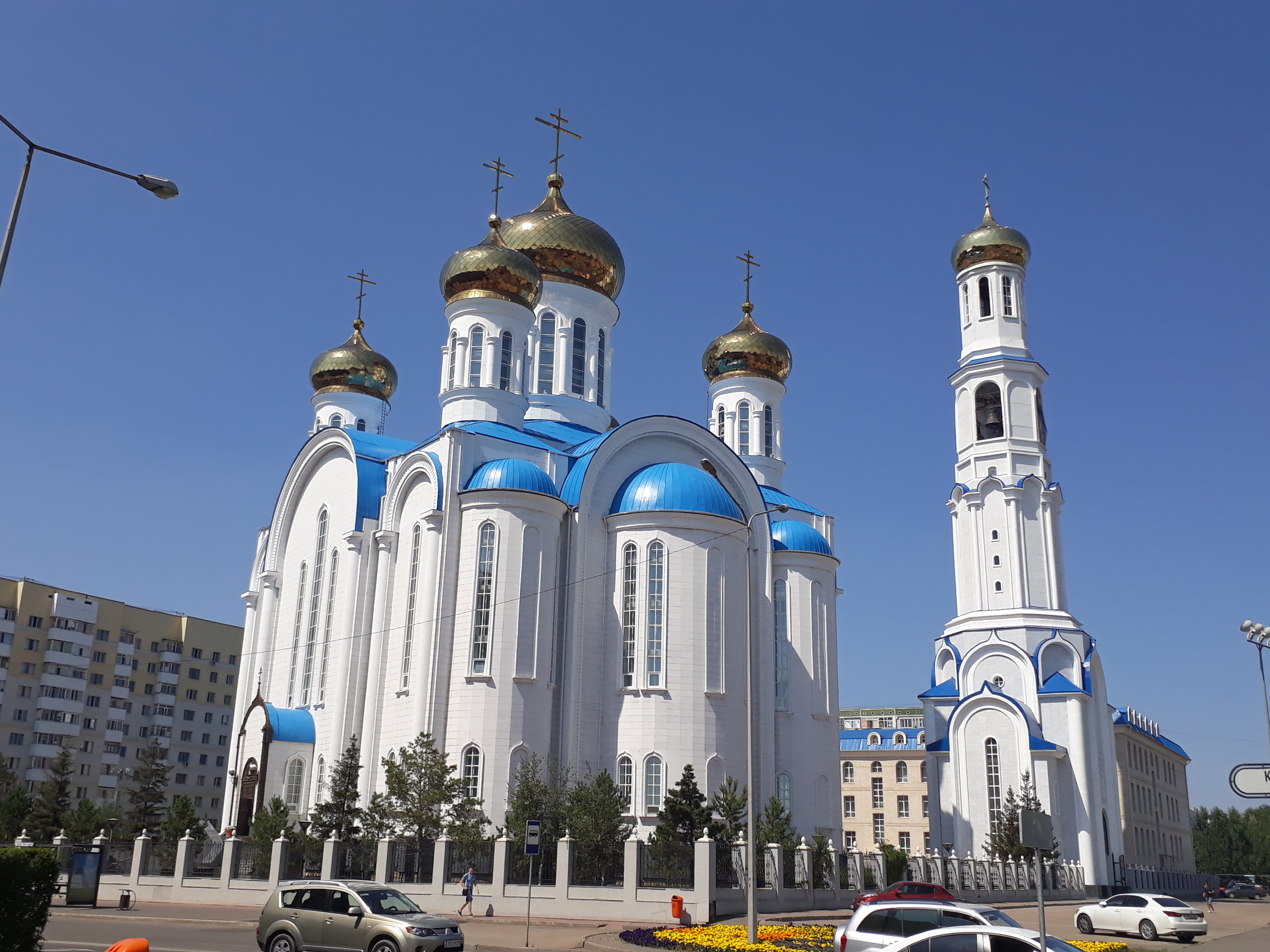 Кафедральный Успенский собор, август 2017